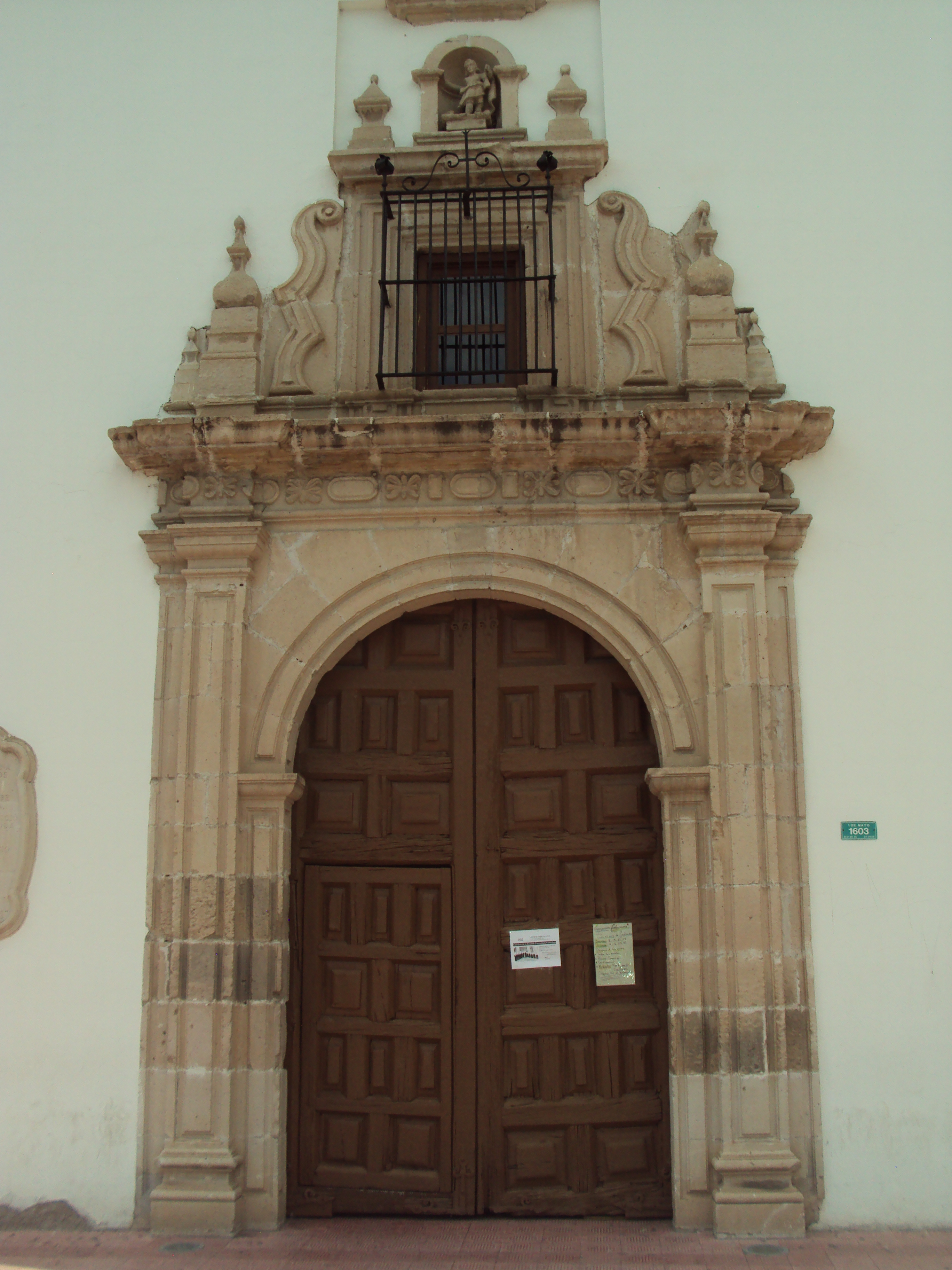 Detalle de la portada del Templo de Santa Rita en Chihuahua, Chihuahua